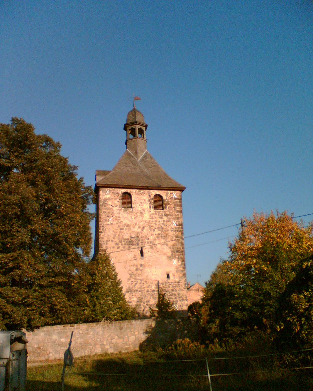 Turm der Kirche in Rieder (Sachsen-Anhalt)